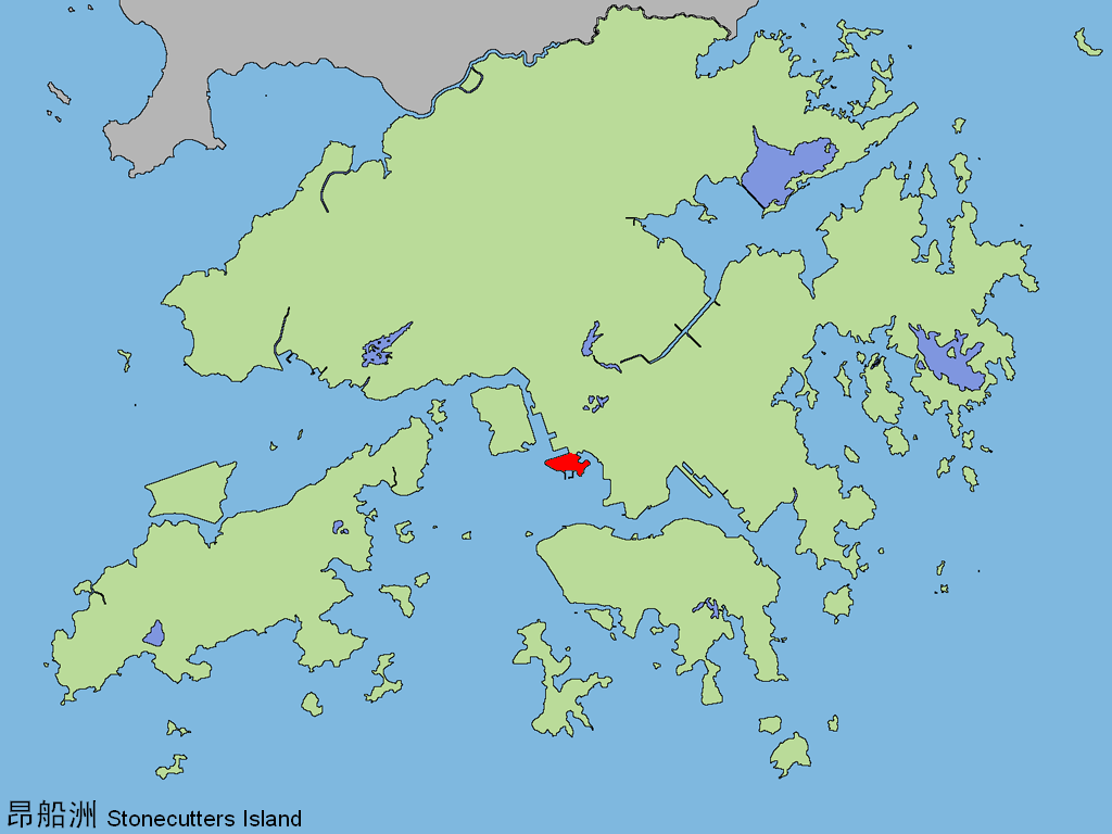 中文（香港）: 昂船洲。